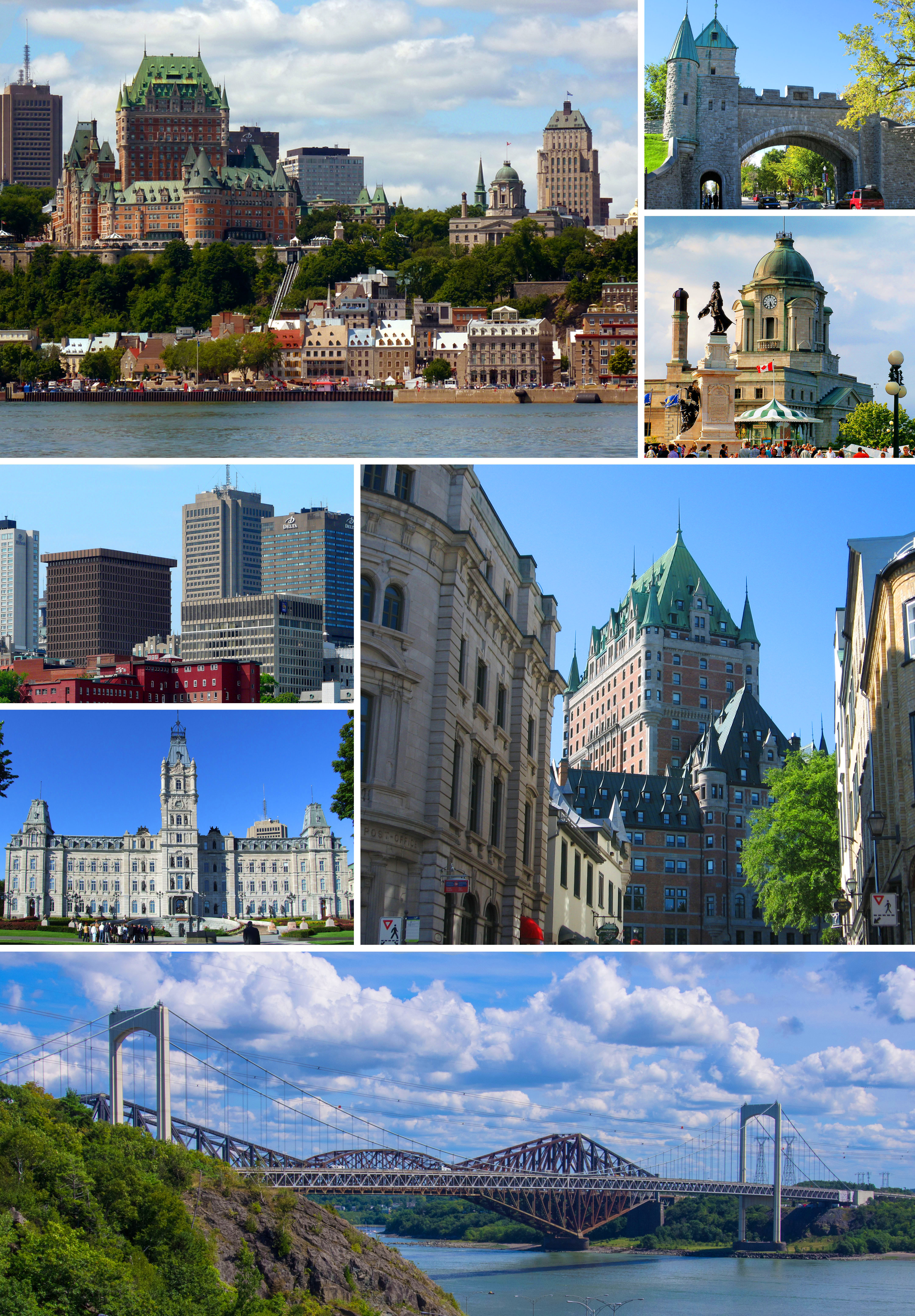 Montage réalisé avec